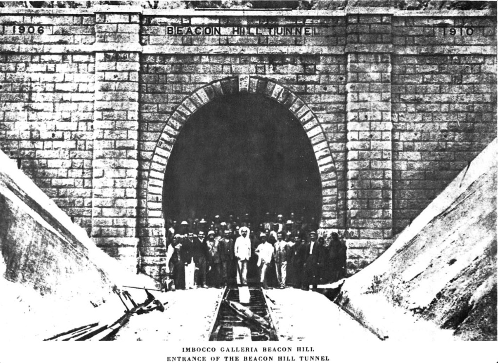 粵語: 煙墩山隧道南口完工合照